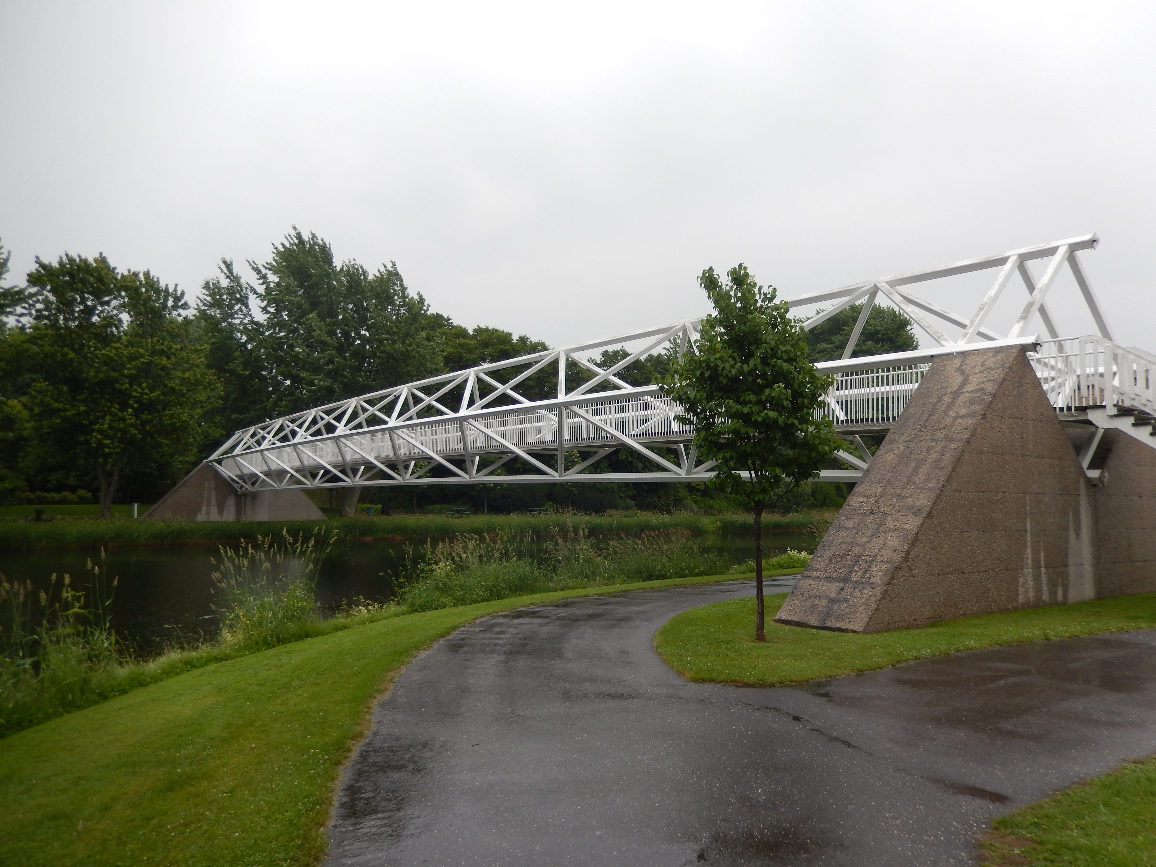 Le passerelle Armand-Vaillancourt à Plessisville, contruite en 1991 et citée immeuble patrimonial en 2010